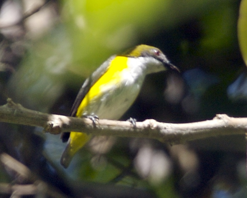 Yellow-sided Flowerpecker Dicaeum aureolimbatum Tangkoko, Sulawesi, Indonesia 9th. July 2006 Indonesian name: Tomi-tomi kakuni